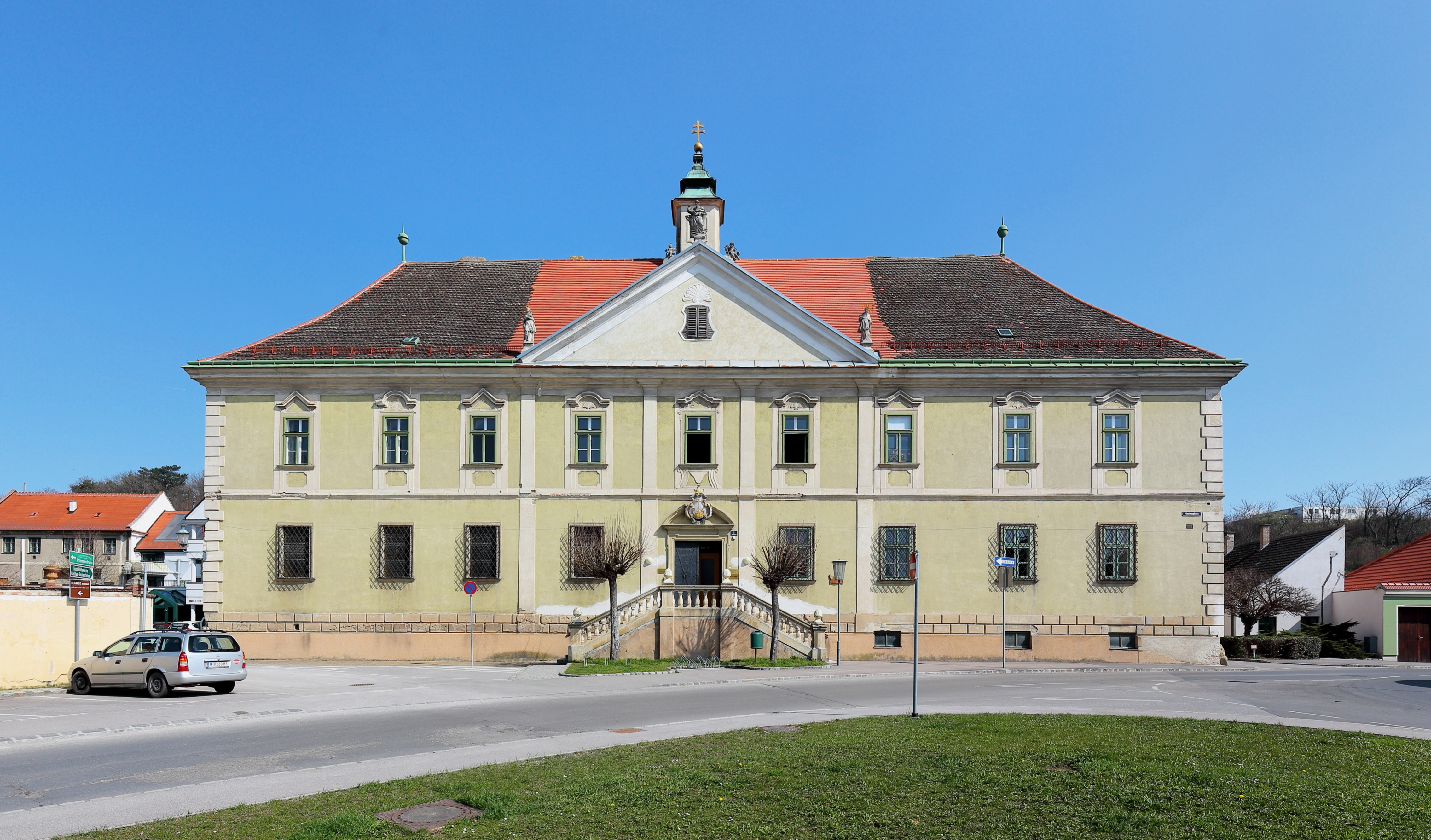 Südansicht des römisch-katholischen Pfarrhofes in der niederösterreichischen Bezirkshaupstadt Mistelbach.Die ehemalige Propstei der Barnabiten am Marienplatz Nr. 1 ist ein vierflügeliges, zweigeschossiges Bauwerk um einen quadratischen Innenhof und wurde von 1687 bis 1700 errichtet. Bis 1787 wurde der Bau als Ordensschule der Barnabiten genutzt, akutell als Pfarramt und Soziales Zentrum.